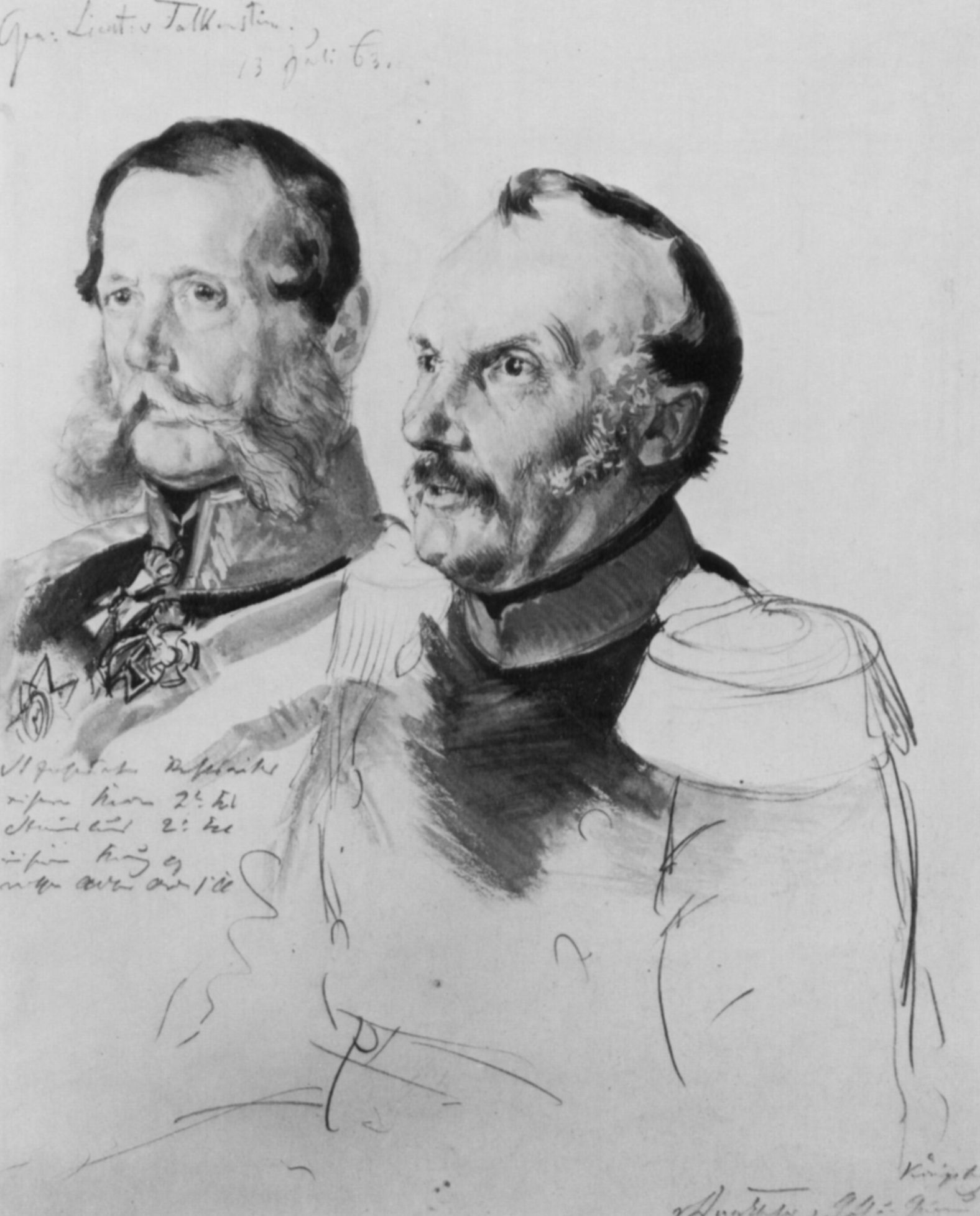 Studie zum »Krönungsbild Wilhelm I.«, Porträts von Friedrich Wilhelm Gustav von Dankbahr und Friedrich Karl Ernst Eduard Vogel von Falckenstein Bleistift und Wasserfarben, auf Papier, 28,9 × 22,6 cm, Ursprünglich:Berlin, Kupferstichkabinett